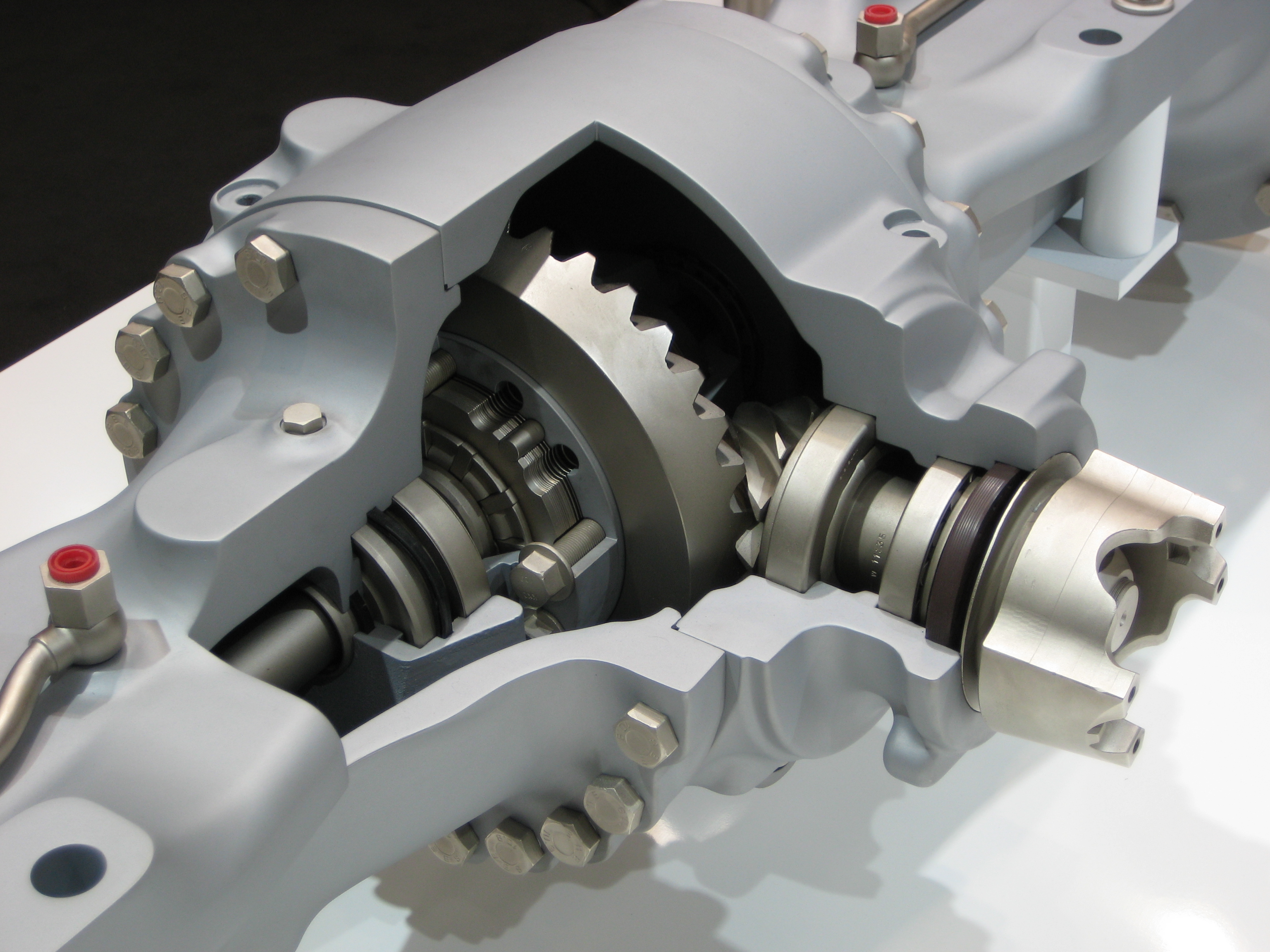 BAUMA 2007, ZF Lader-Achse MT-L3075